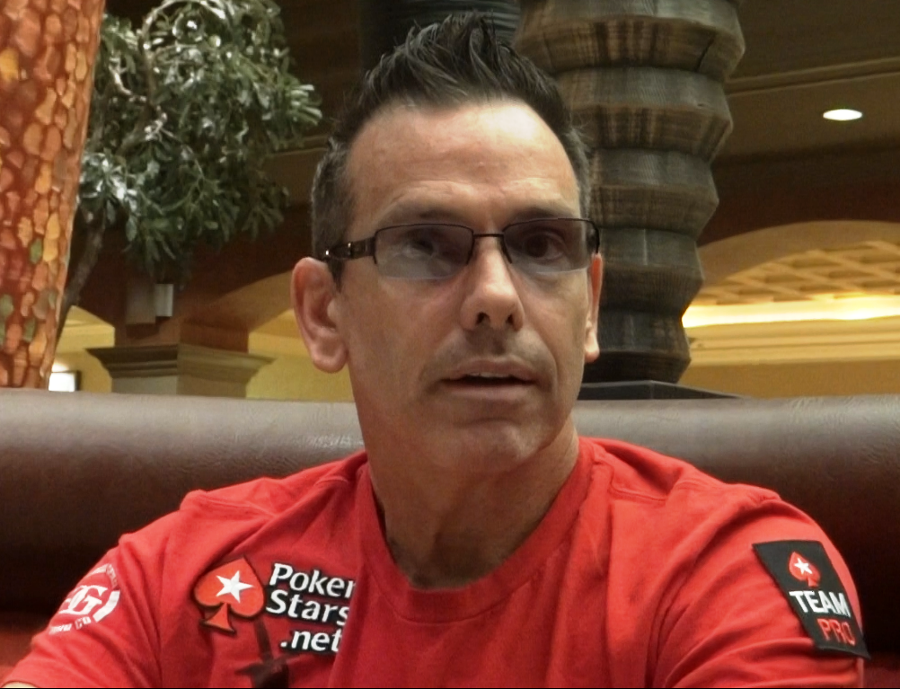 Chad Brown in Las Vegas 2012